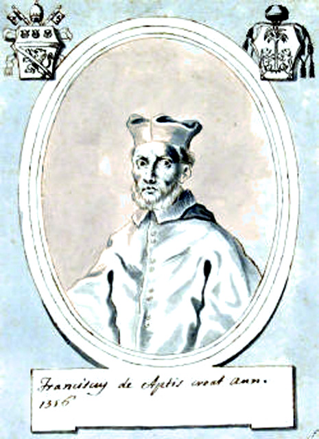 Cardinal Francesco degli Atti